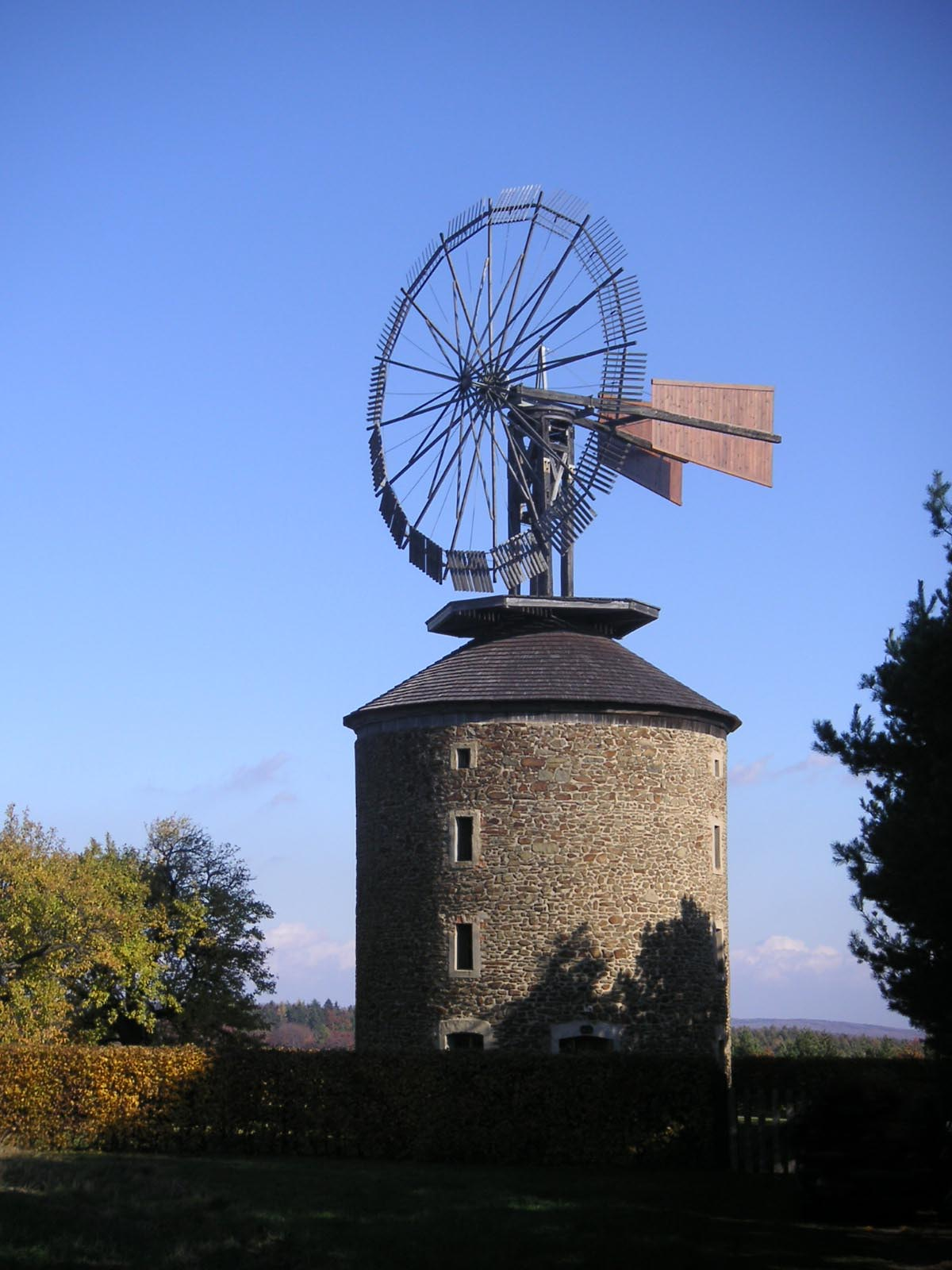 větrný mlýn v Ruprechtově